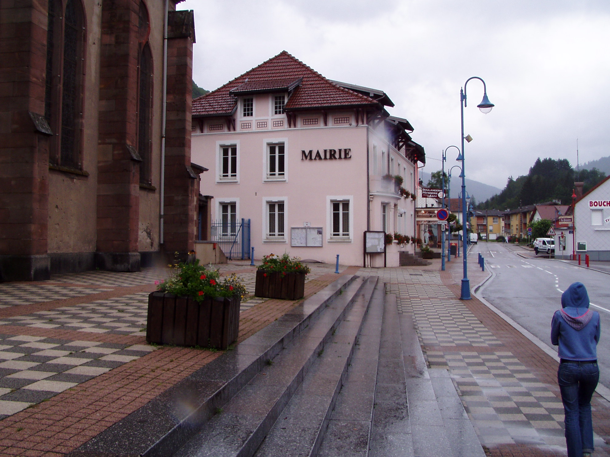 Cornimont, la Mairie